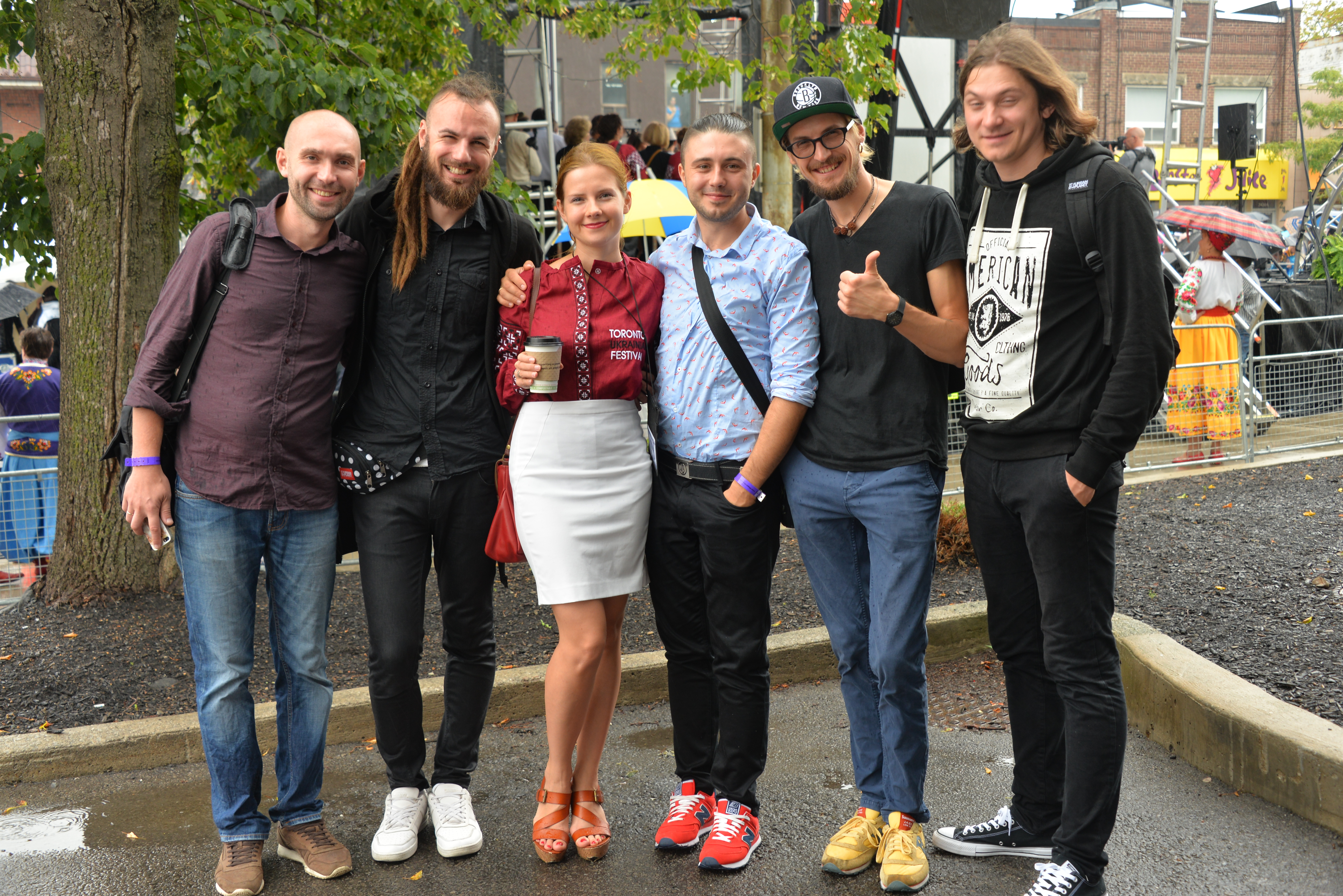 Гурт "Антитіла" з ведучою Українського фестивалю на Блюр Вест (Ukrainian Bloor West Village Festival) Олександрою Лебедь